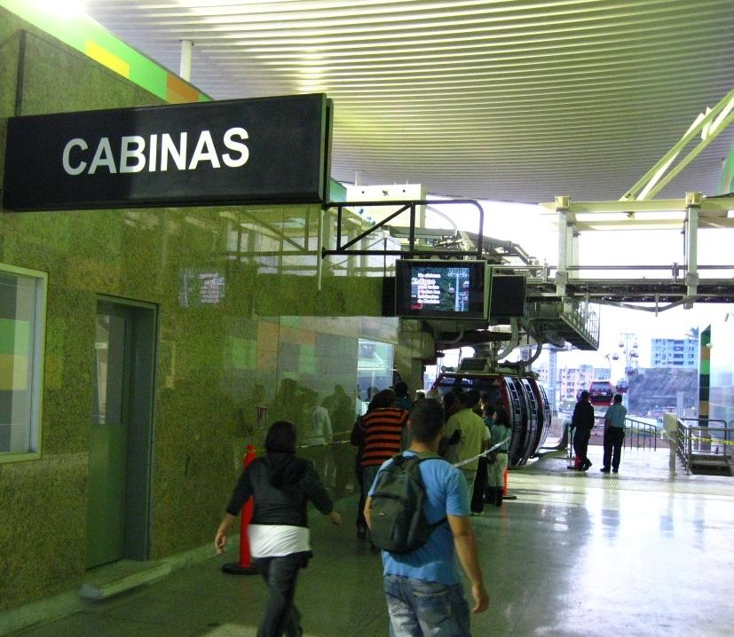 metrocable de caracas estacion mariche